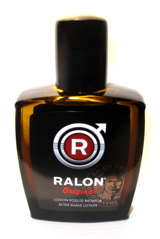 "Ralon Original" (mit Campher) aus Kroatien (2016)